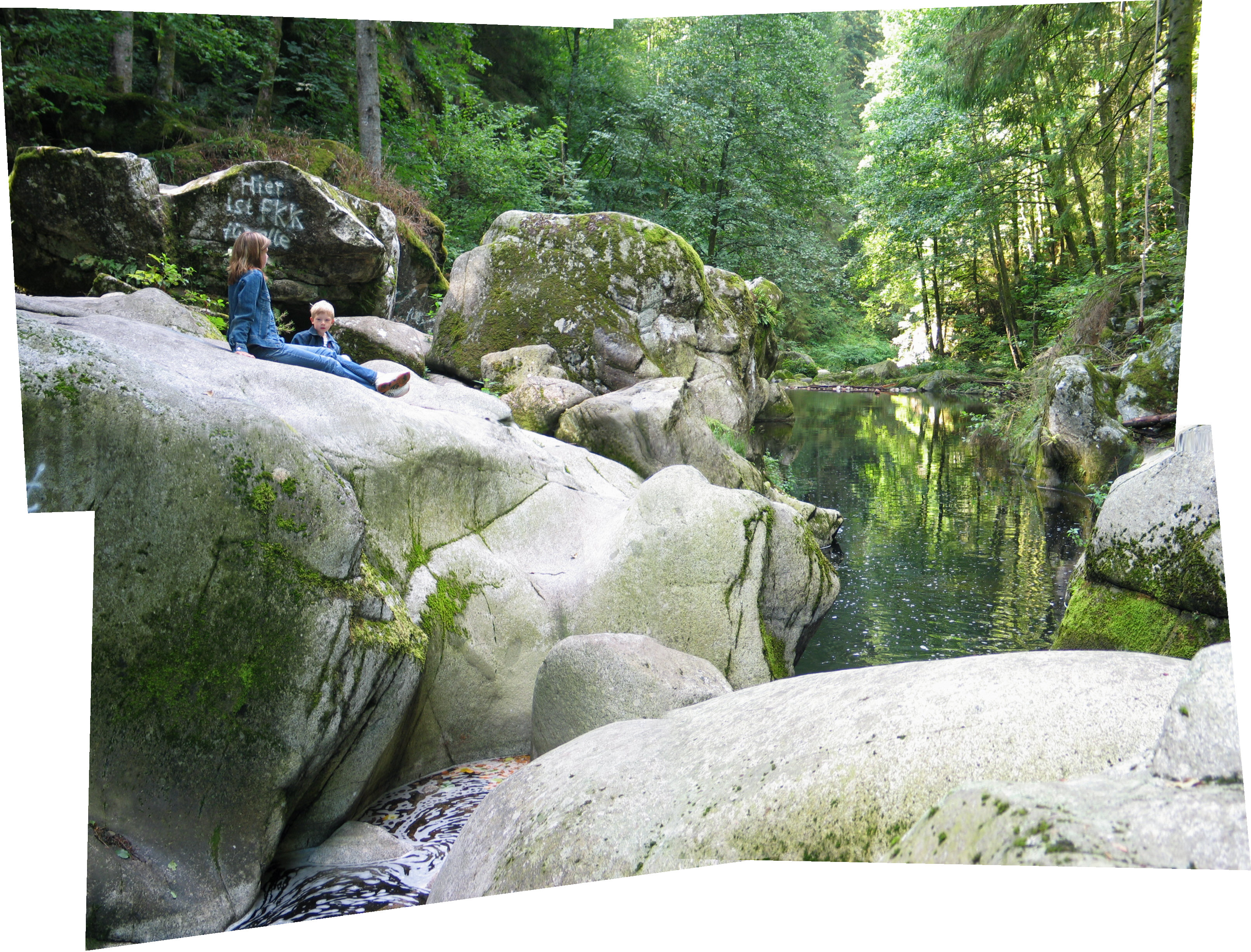 Teufelsküche, Gletschertopf im Albtal